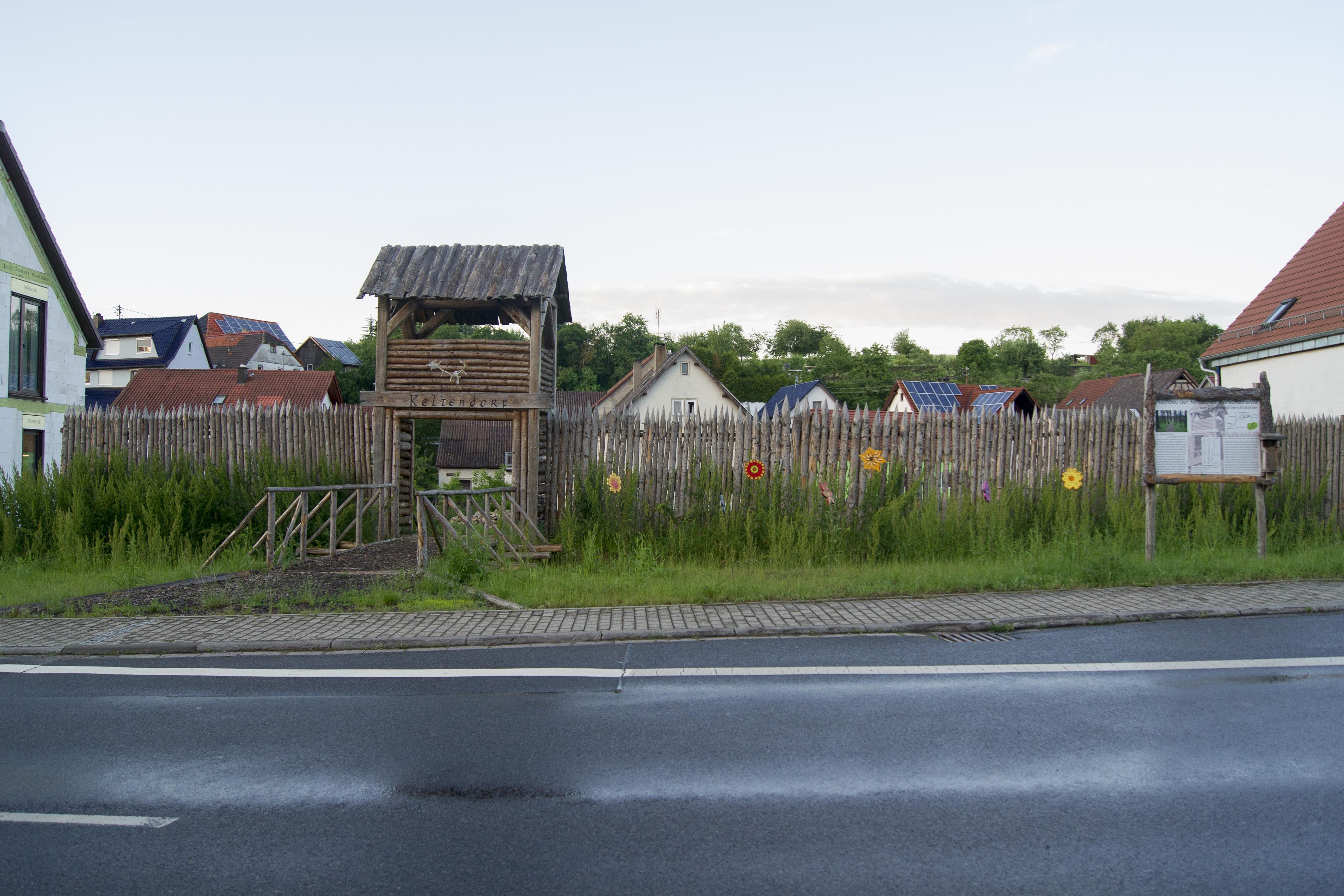 Nachbau der Keltenschanze für die 800-Jahrfeier von Gerichtstetten 2014